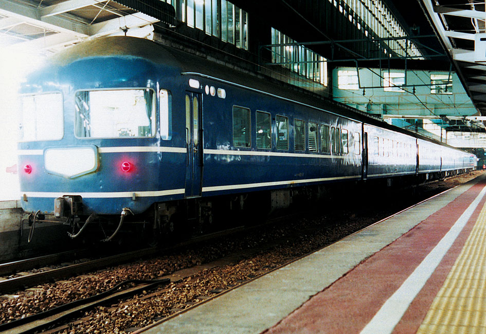 国鉄20系寝台客車 急行玄海